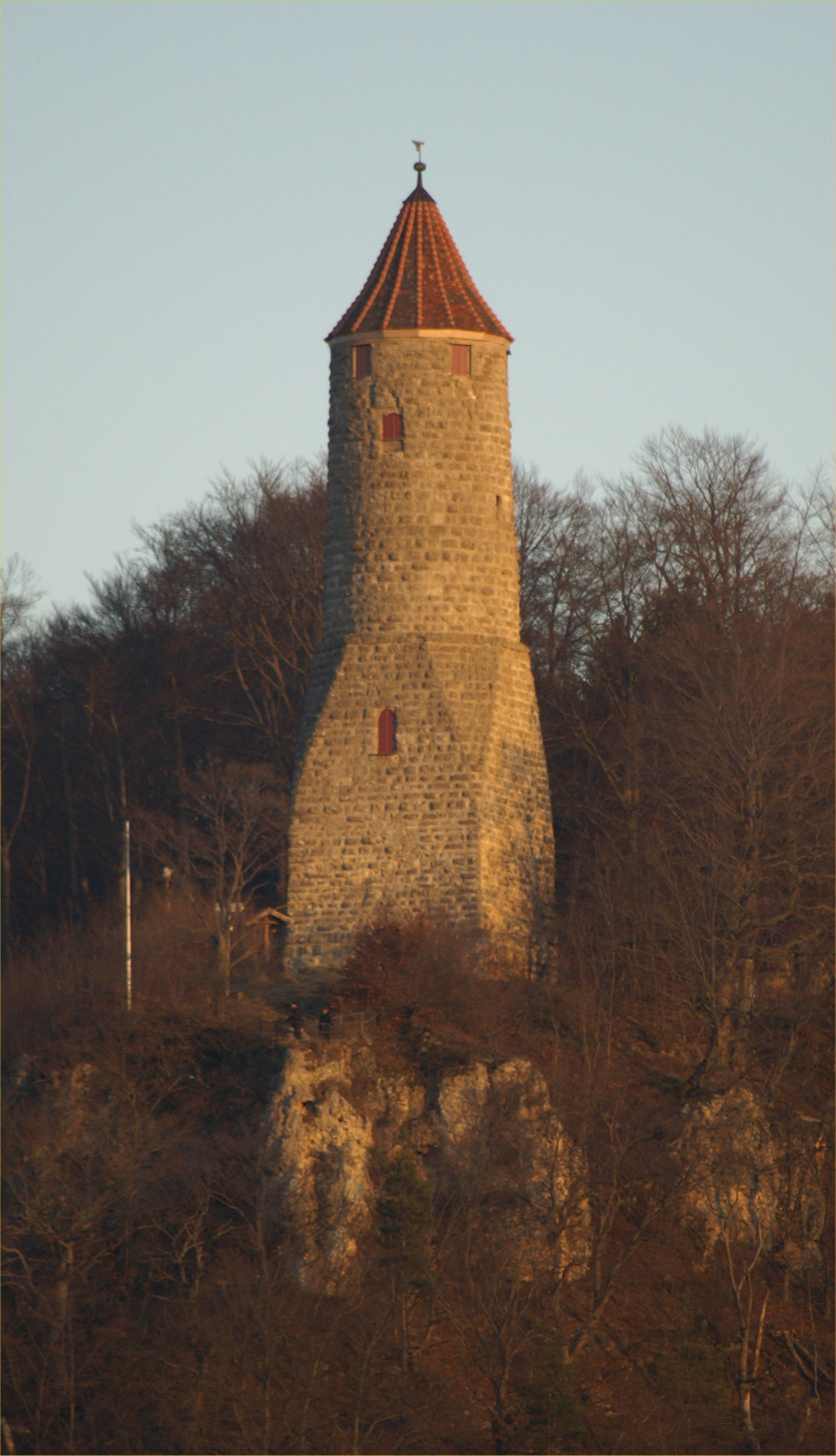 Der Ödenturm über Geislingen an der Steige